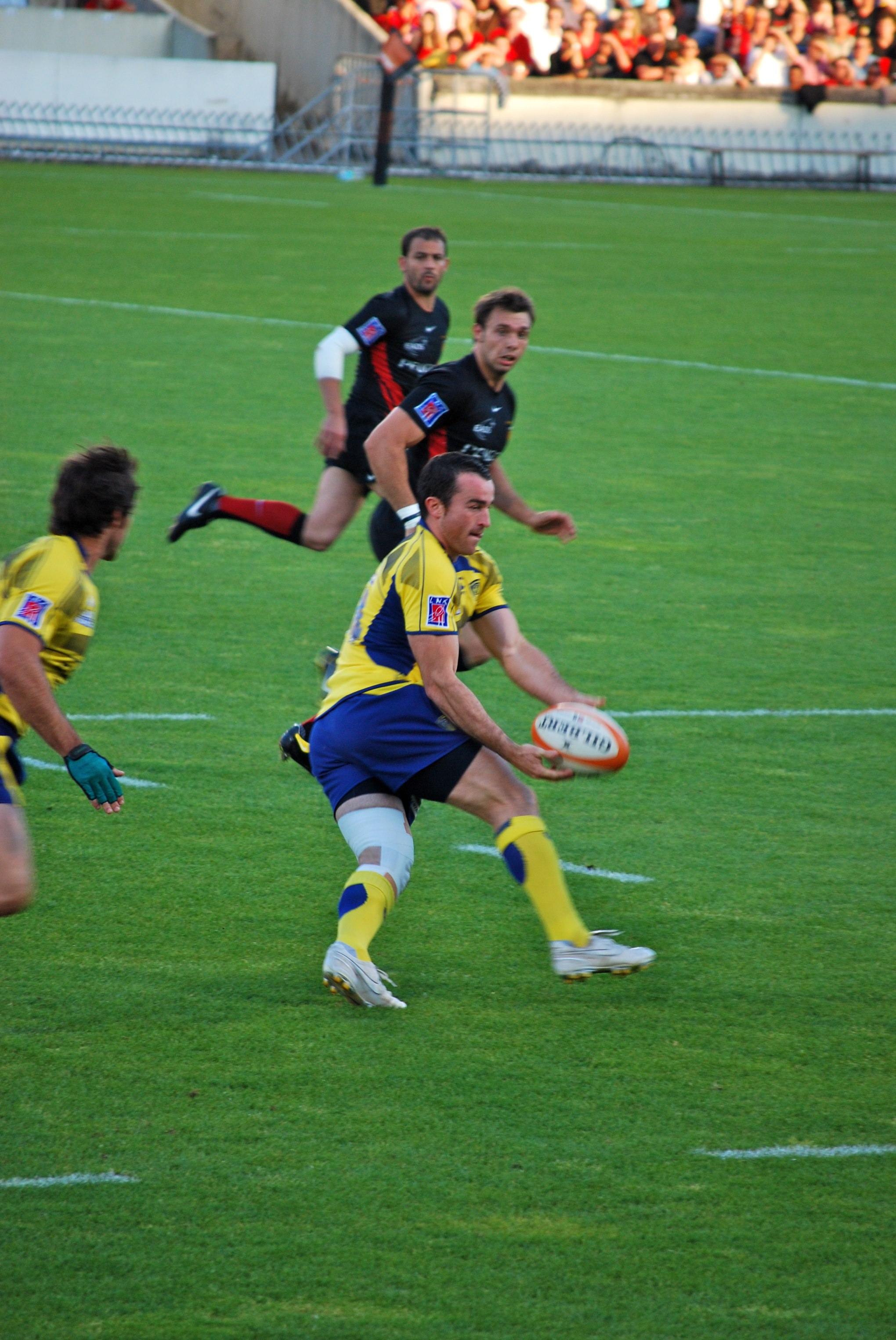 Benoît Baby faisant un offrande à son demi d'ouverture lors de la demi-finale de top 14 2008-2009 opposant Clermont à Toulouse